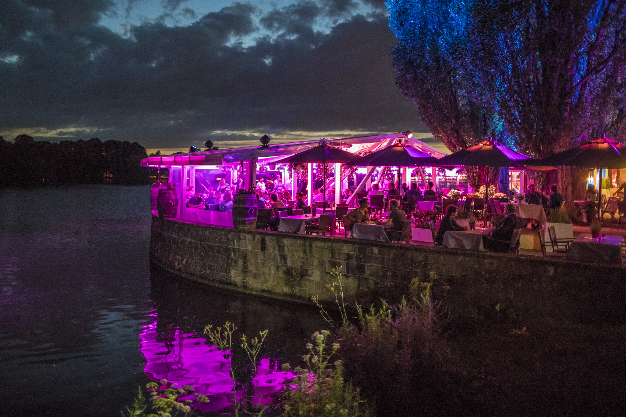 Maschseefest Löwenbastion, Seeseite